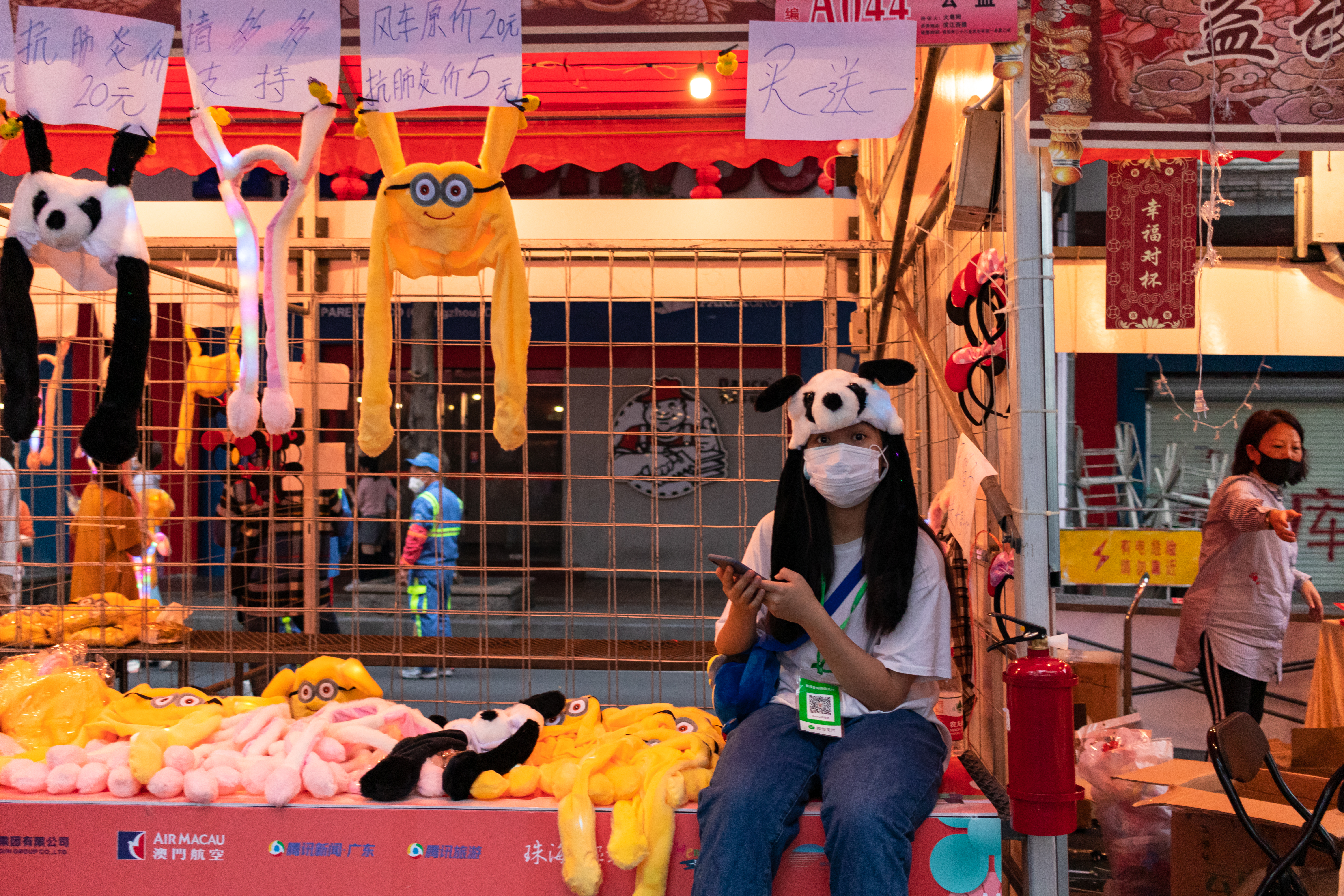 Spring Festival Niña con mascarilla en Pekín (República Popular China)